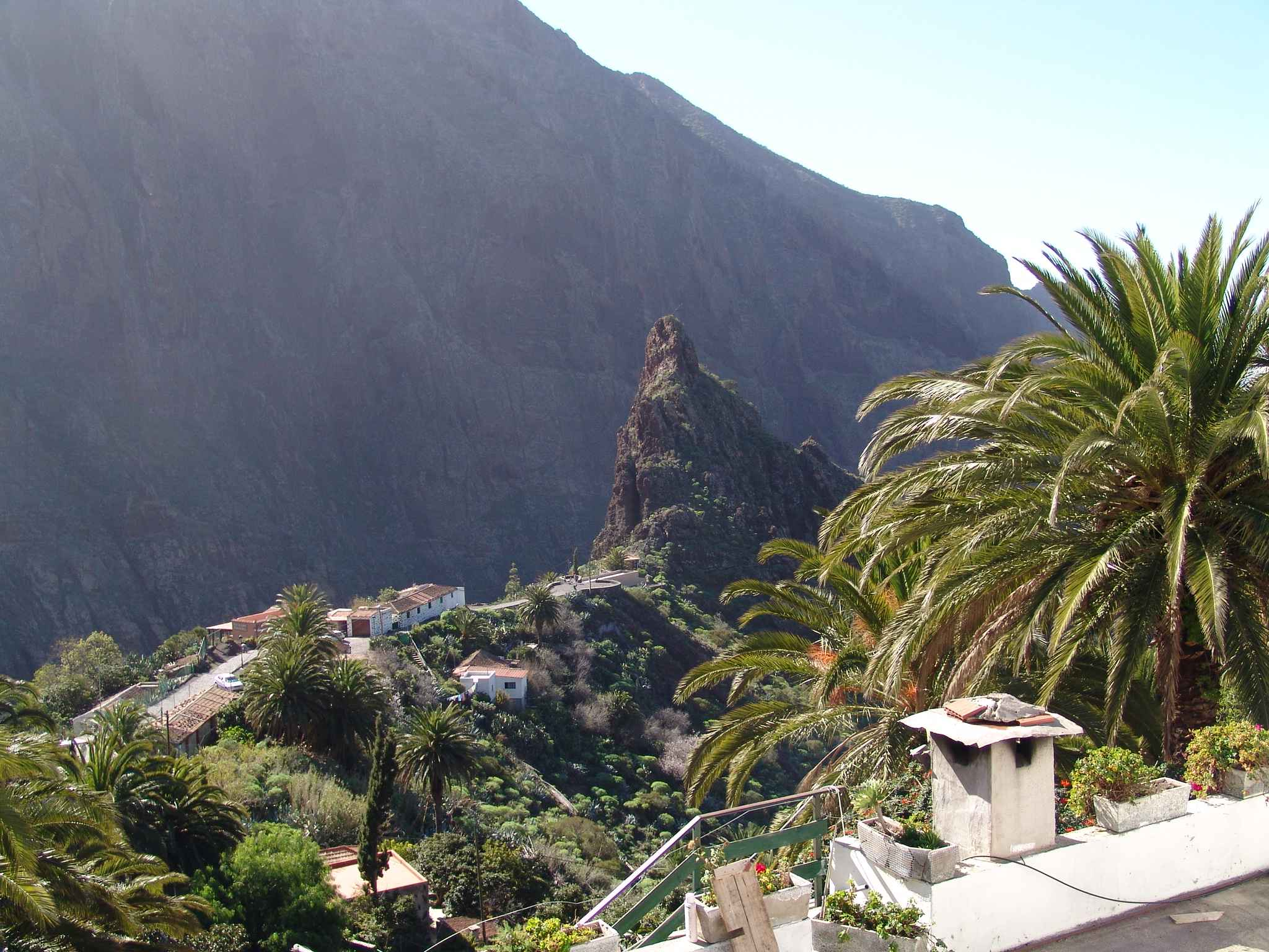 Beschreibung: Masca (Teneriffa) im Januar 2005 Quelle: selbst fotografiert Lizenz